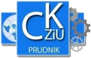 Centrum Kształcenia Zawodowego i Ustawicznego w Prudniku logo